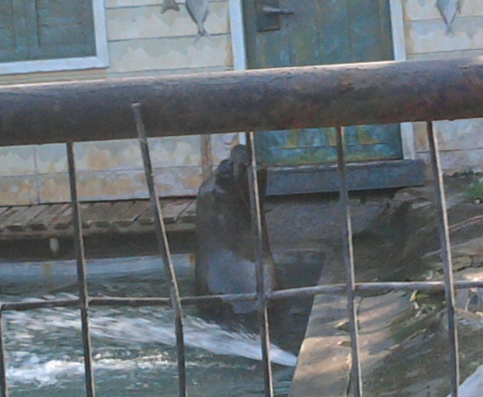 recortado